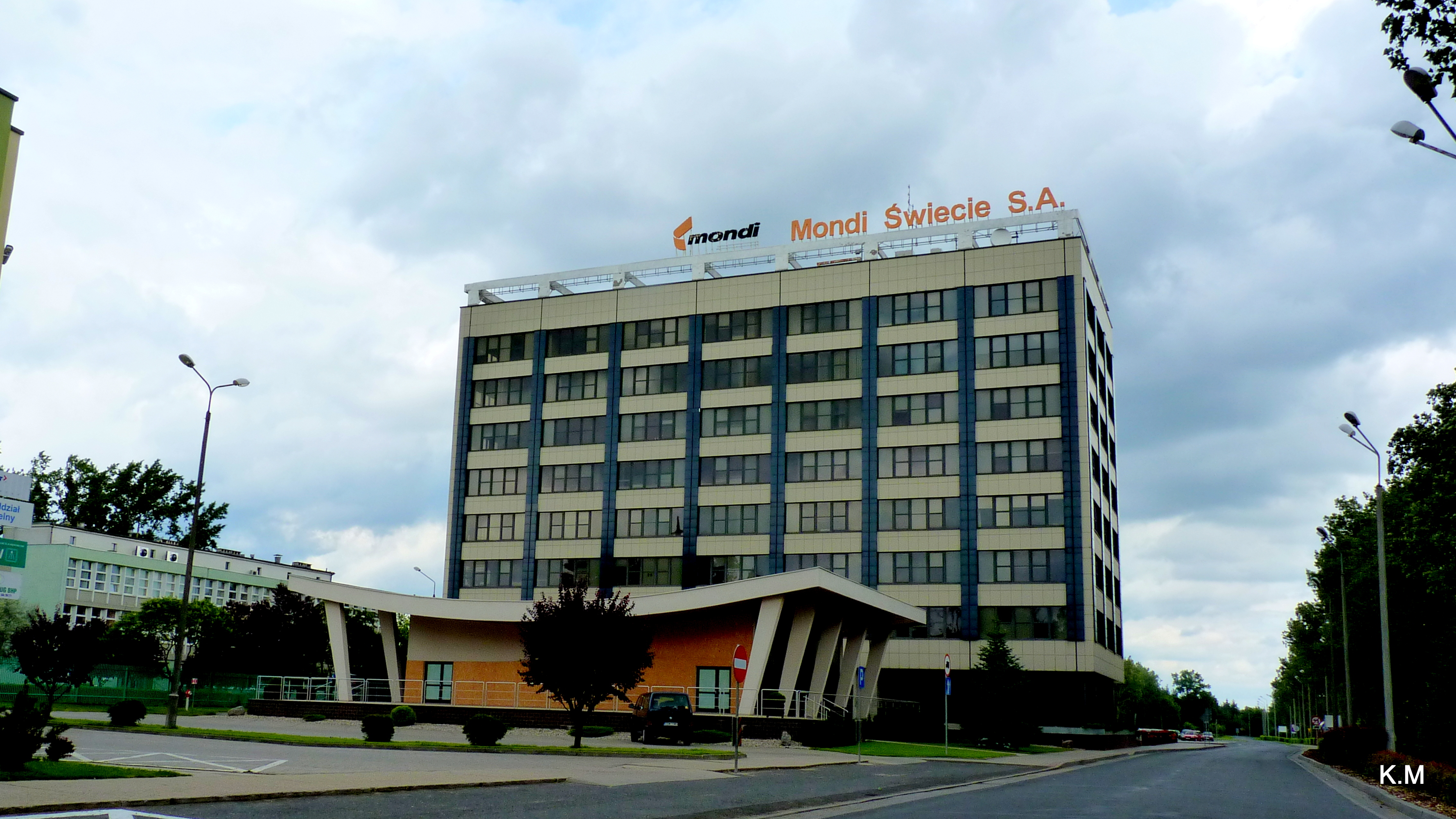 Świecie - Zakłady Papiernicze.